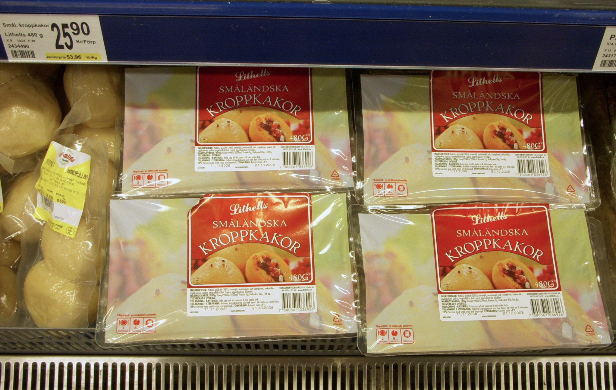 Schwedische "Smålandkroppkakor" im Kühlregal